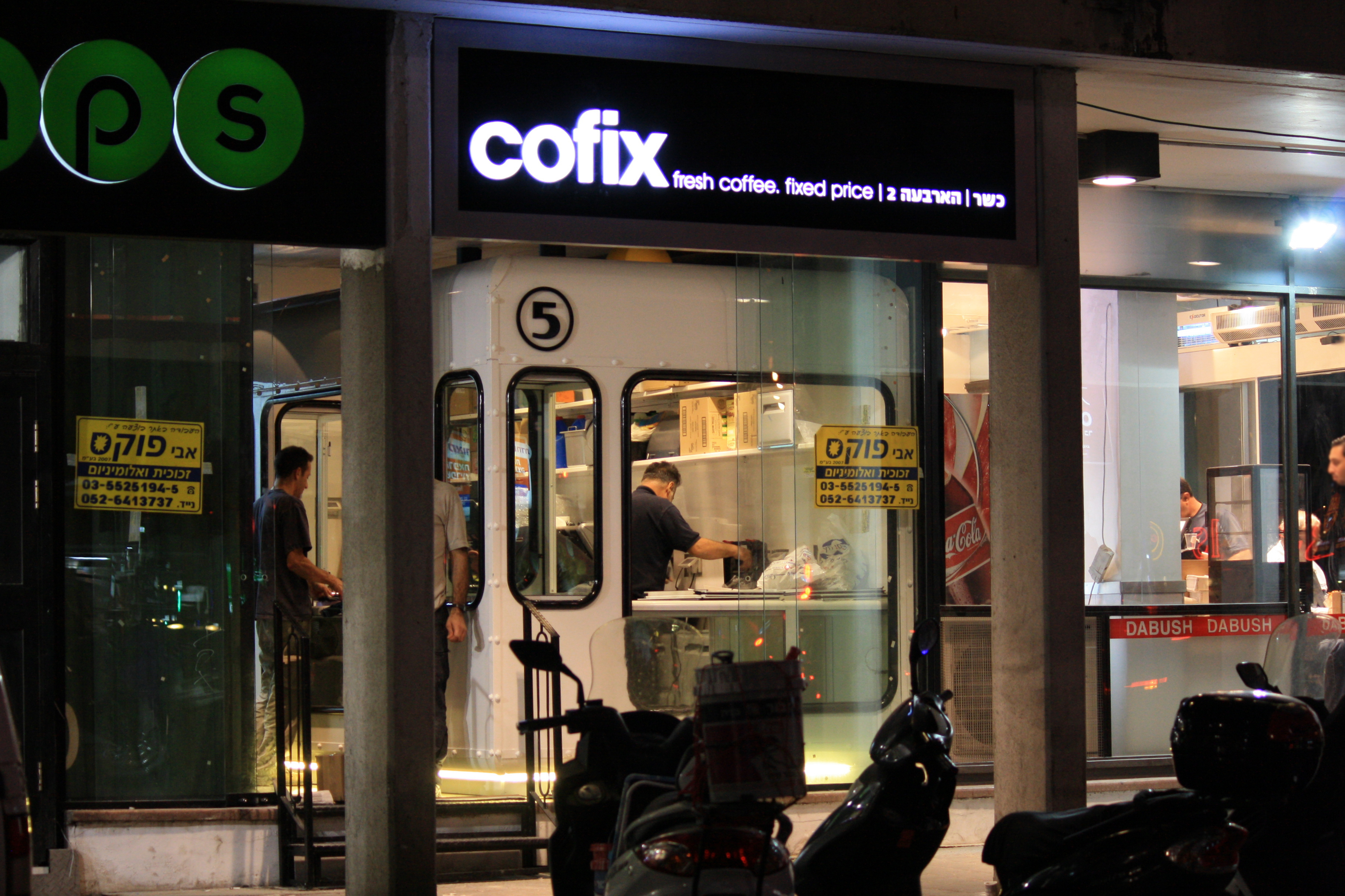 סניף קופיקס ברחוב הארבעה, נובמבר 2013.